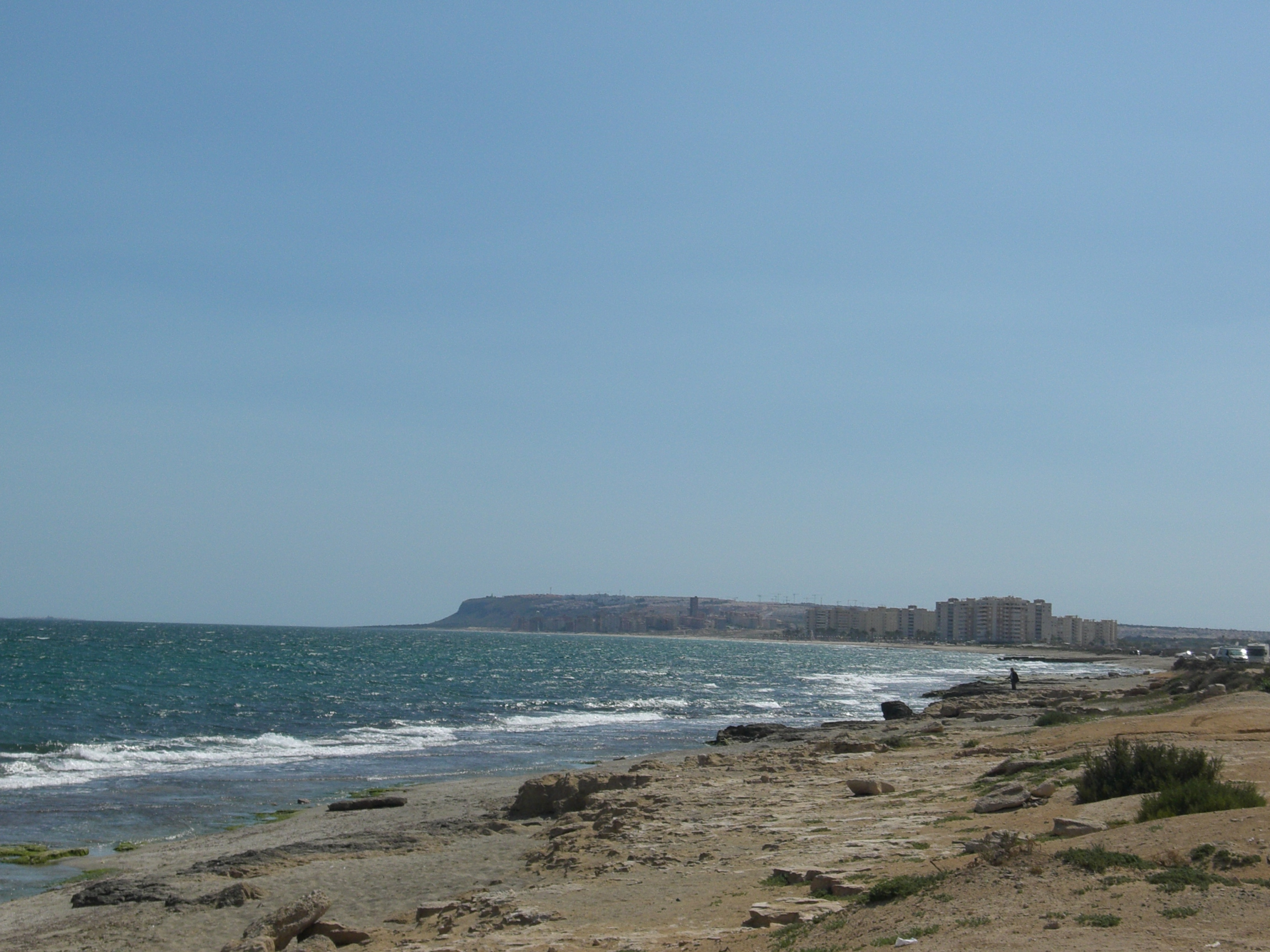 Cala dels borratxos, poc abans de la platja d'Aiguamarca, Alacant. Badia d'Alacant.